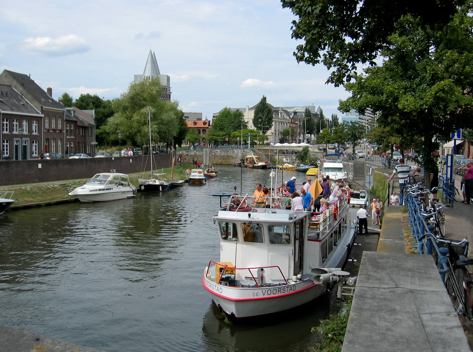 Rurkade in Roermond 2010